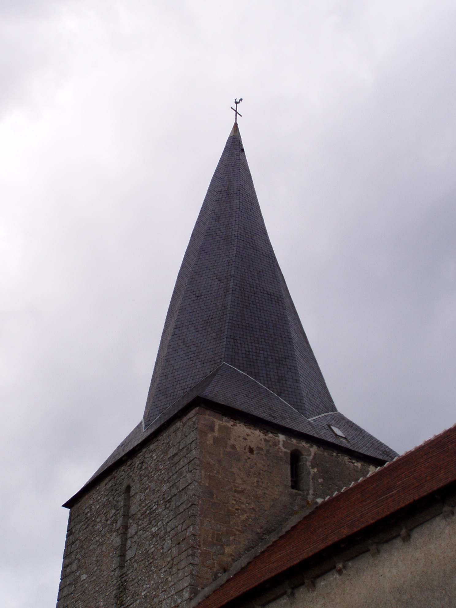 Photographie du clocher tors de l'église Saint-Médard de Naillat en Creuse, prise par Accrochoc le 02 septembre fr:2006.